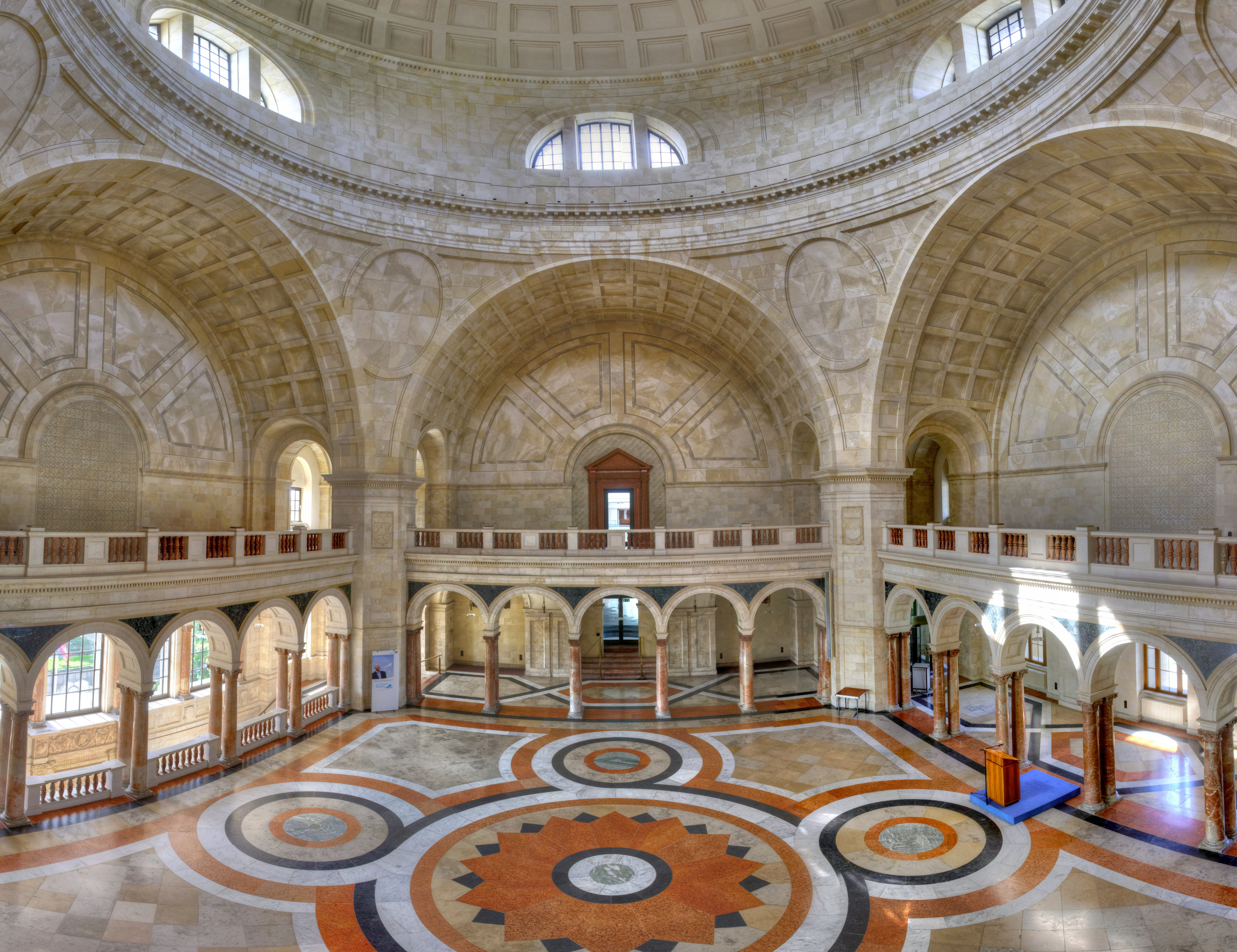 Landtagsprojekt Bayern